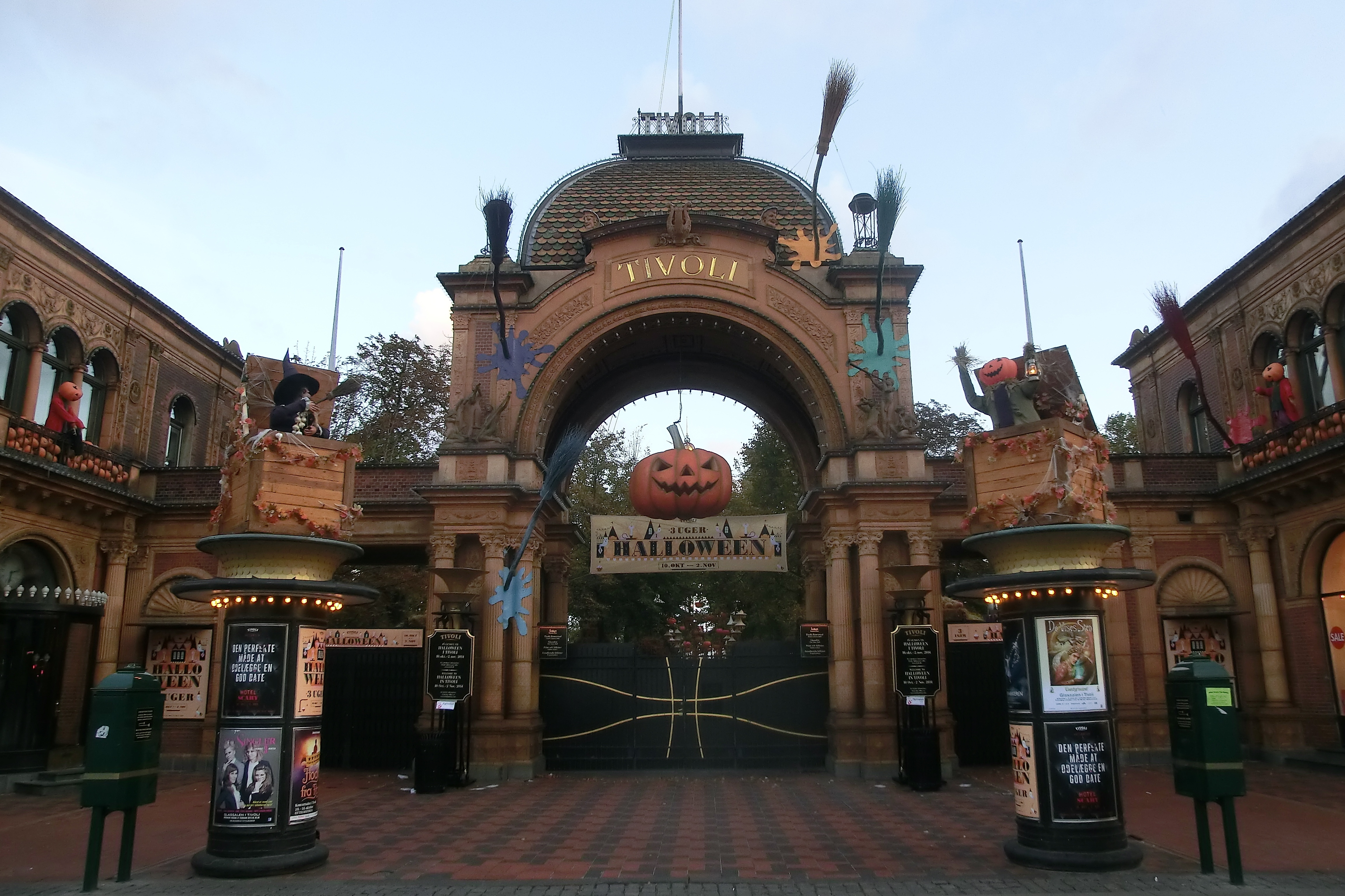 Giardini di Tivoli Copenhagen